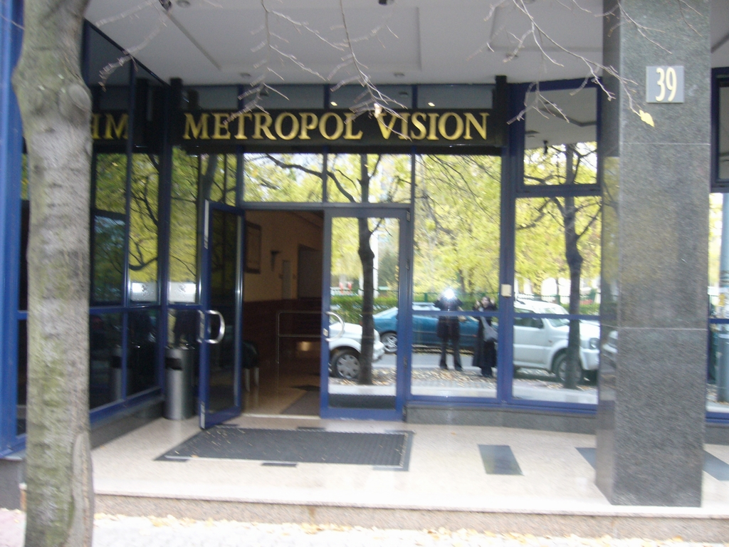 A Metropol (akkor még Metro) szerkesztőségének bejárata (1134 Budapest, Tüzér utca 39-41).